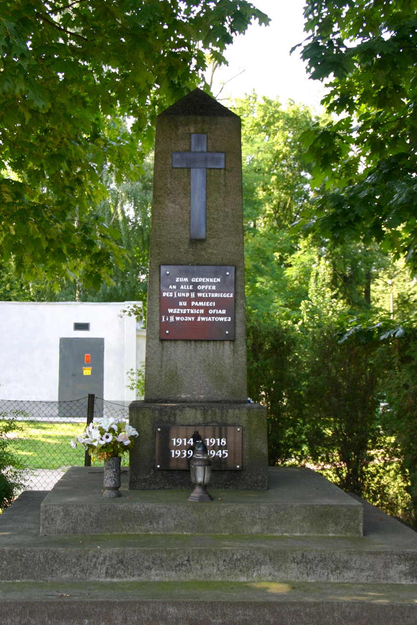 Dobra (dodatkowa nazwa w j. niem. Dobrau) – wieś w Polsce położona w województwie opolskim, w powiecie krapkowickim, w gminie Strzeleczki.